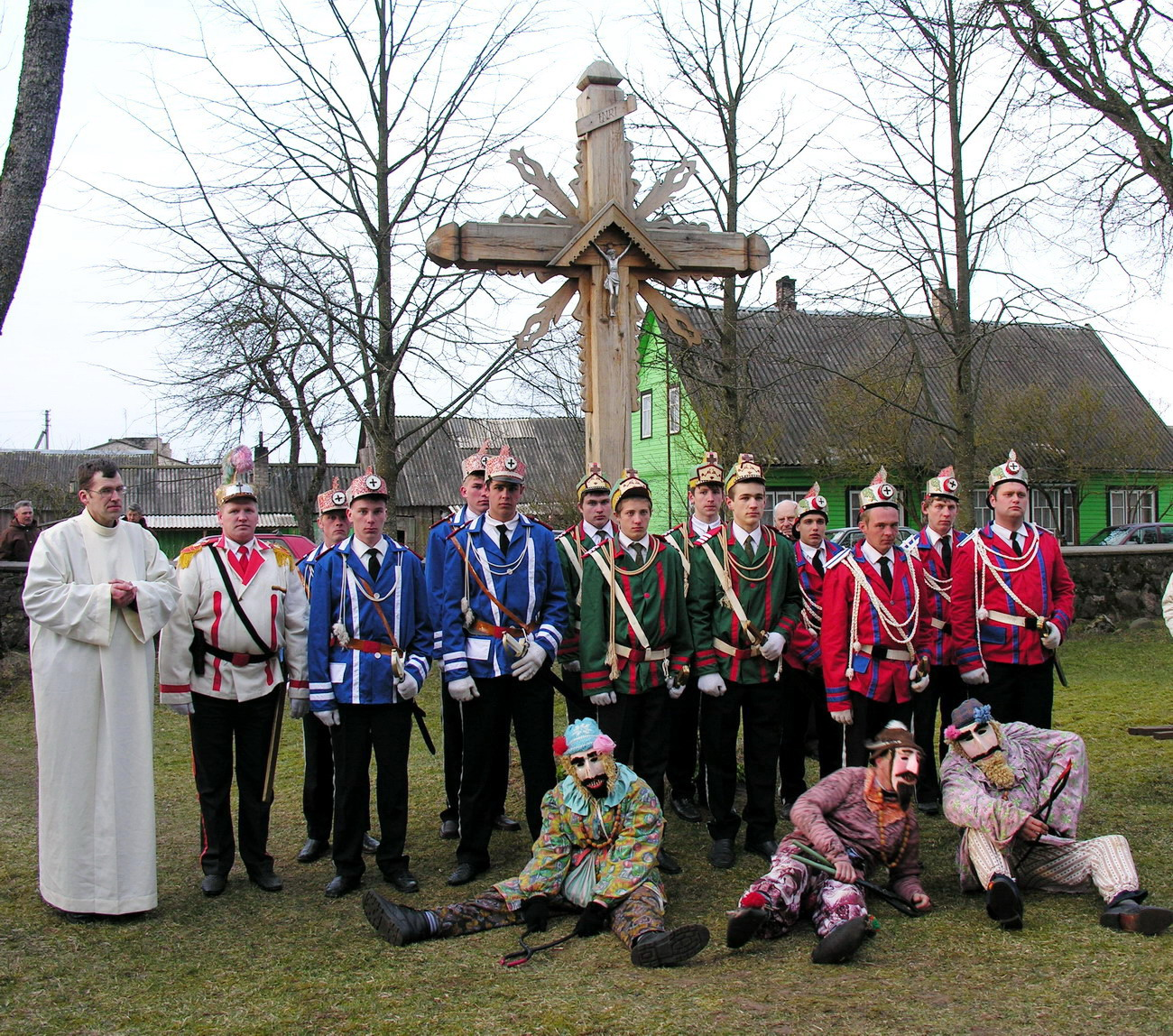 Pievėnų velykžydžiai. Vienintelis Europoje išlikęs paprotys - tetralizuotas velykžydžių budėjimas Pievėnų bažnyčioje 2007 m. balandžio 8 d.